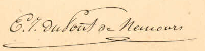 signature of Eleuthère Irénée du Pont